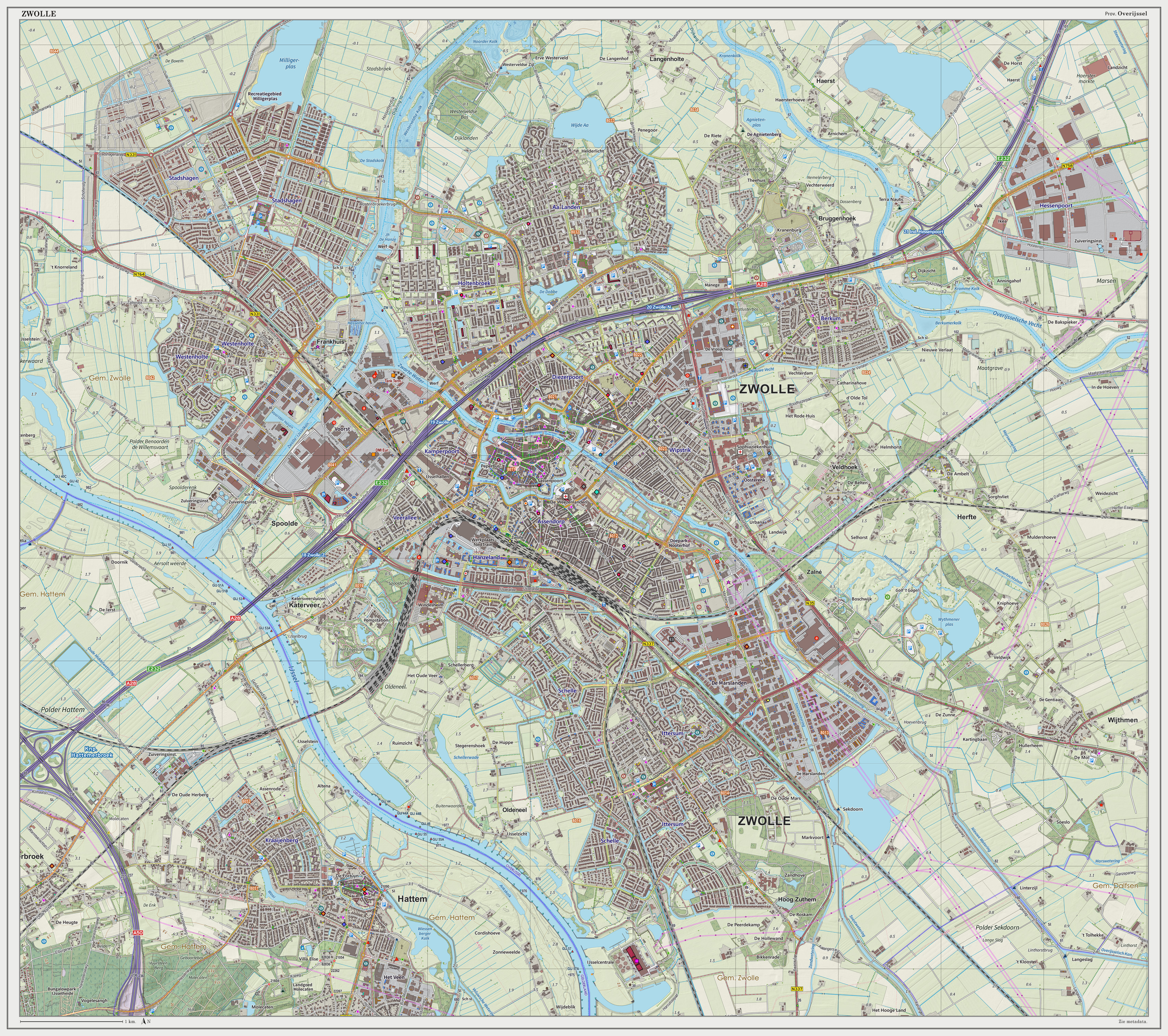 Topografische kaart van Zwolle (woonplaats). Resolutie: 300 pixels/km. Kaartbeeld samengesteld uit de open geodata van de Top10NL en Top25namen (Basisregistratie Topografie, Kadaster), Creative Commons BY licentie. Gebouwvlakken uit open geodata BAG extract. Wegen uit de OpenStreetMap. Reliëfschaduw uit de Actuele Hoogtekaart AHN2. Samenstelling en kleurenschema: Jan-Willem van Aalst, met QGIS2. Zie ook de Legenda.